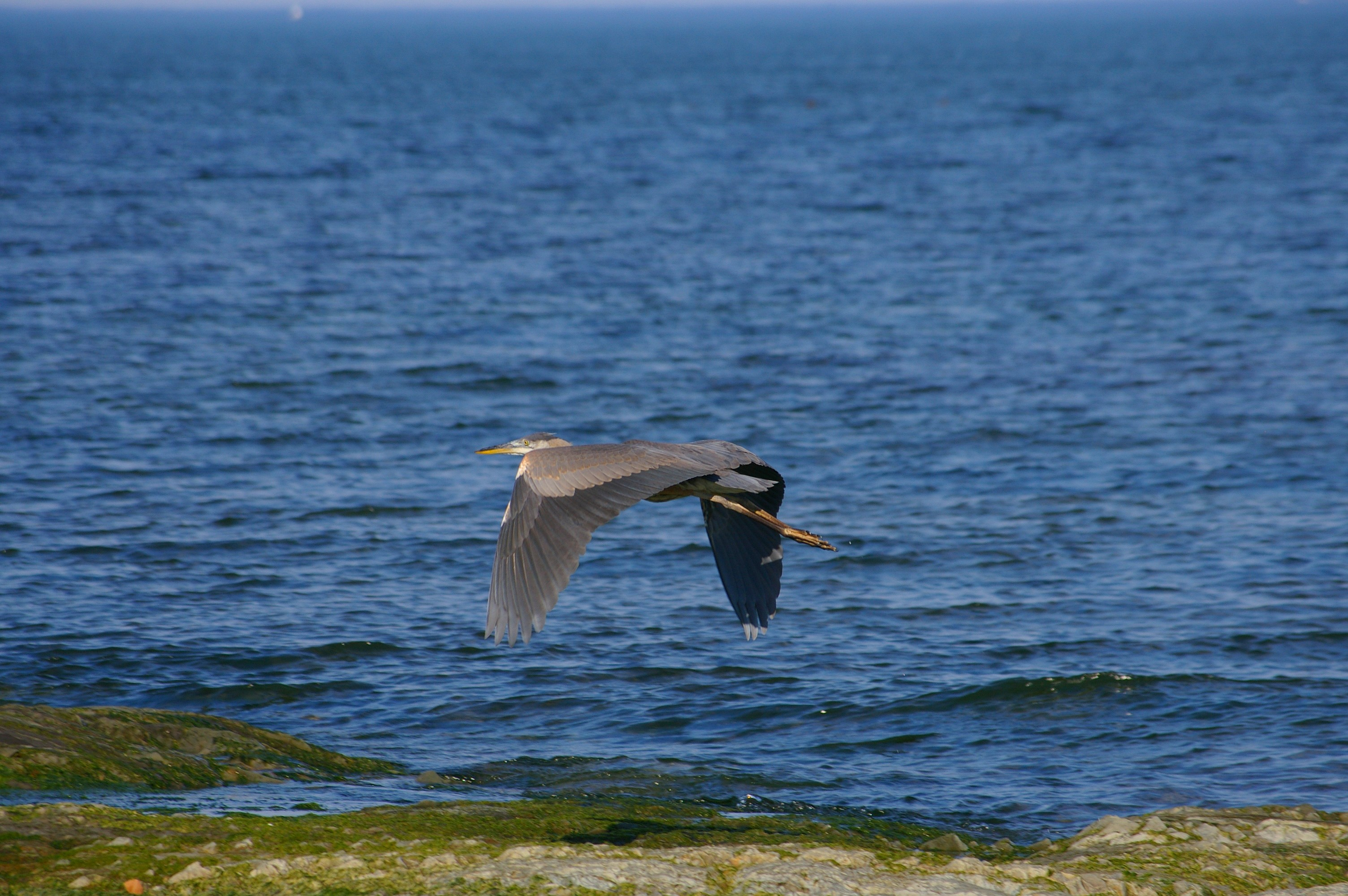 Grand Héron sur le St-Laurent, Québec, Canada